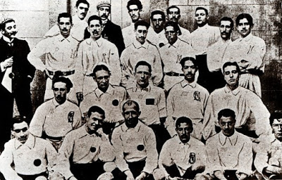 Equipos del Madrid FC y el Club Español durante el Concurso Madrid de 1902